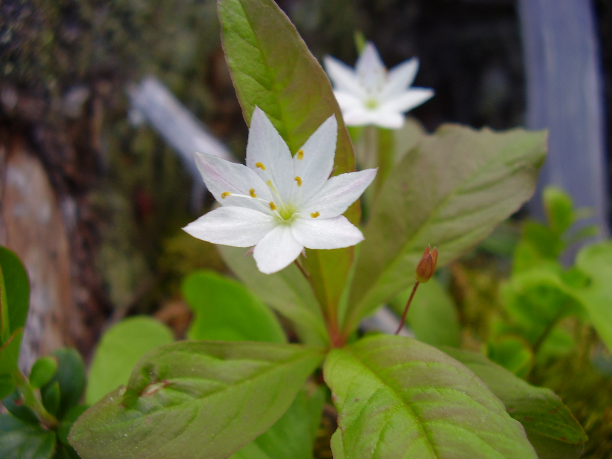 Trientalis europaea Photo taken by Käyttäjä:kompak (9th of June 2005)